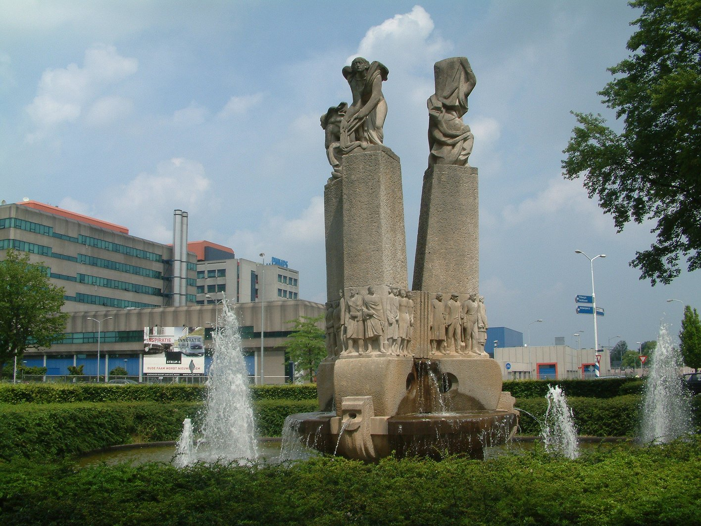 Panta Rhei, kunstwerk (en fontein) van Hubert van Lith met teksten van Victor E van Vriesland, op de hoek Kastanjelaan-Essenstraat-Frederiklaan in Eindhoven